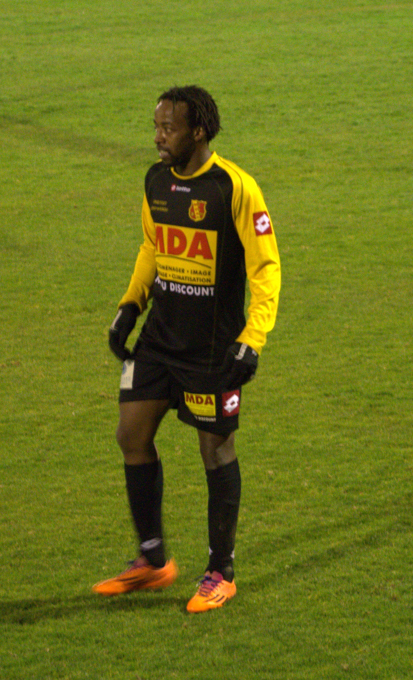 Match Monts d'Or Azergues Foot - Vesoul Haute-Saône Football (0-2) à Chasselay.